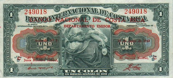 1 колон. Коста-Рика. Аверс. Надпечатка на банкноте Интернационального Банка Коста-Рики - Департамент эмиссии Национального Банка Коста-Рики.